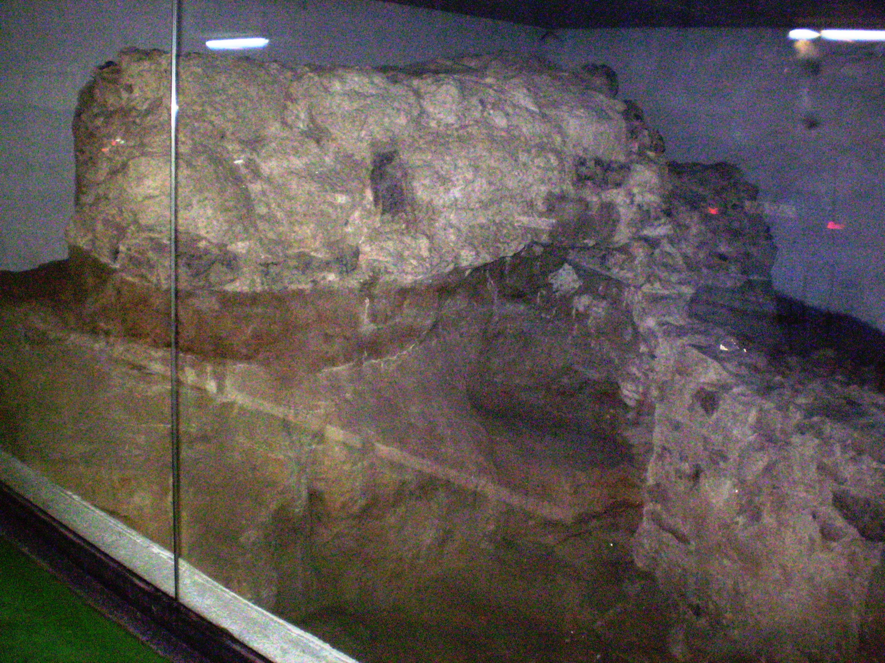 Muralla cristiana de Madrid. Torre de los Huesos. Restos del parking de la Plaza de Oriente